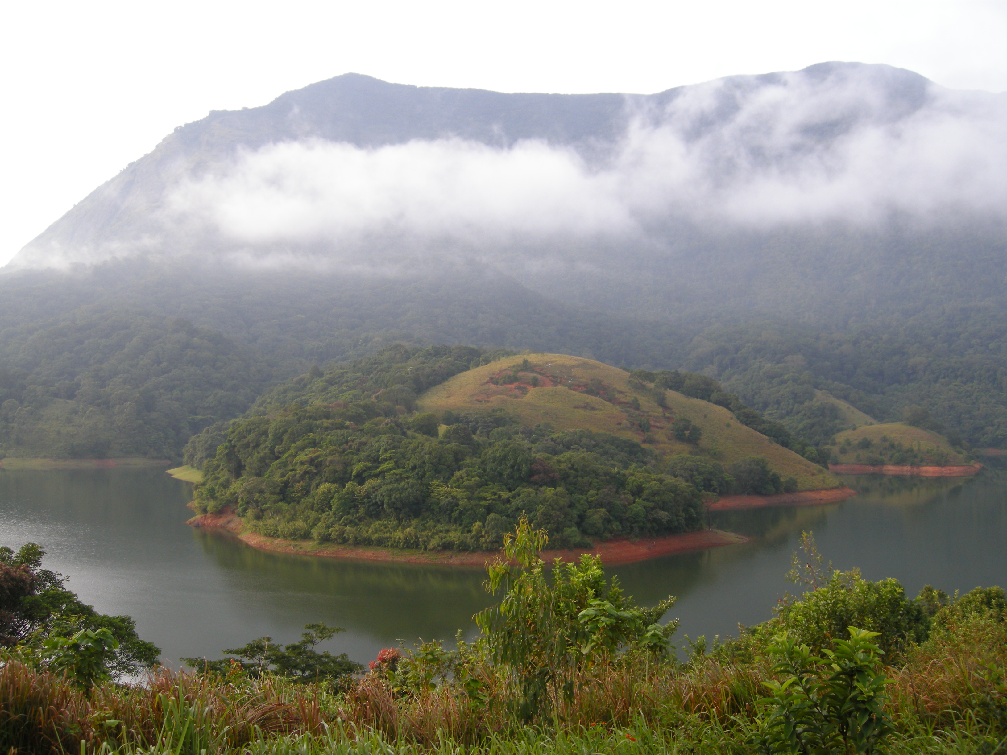 Siruvani Dam(4)